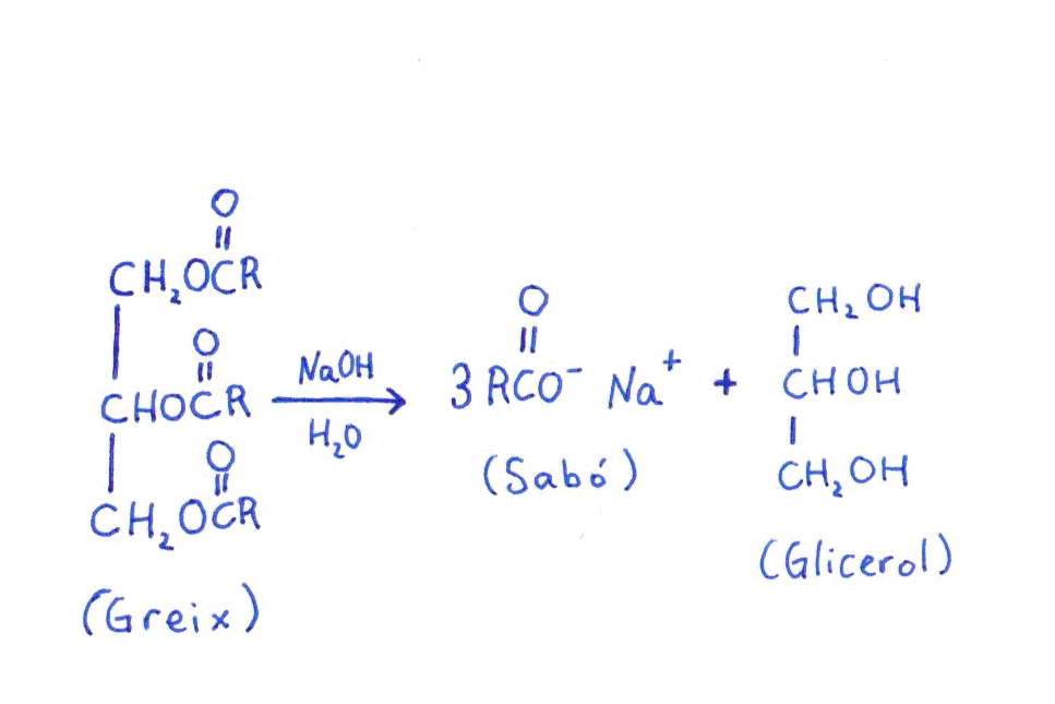 Sabó